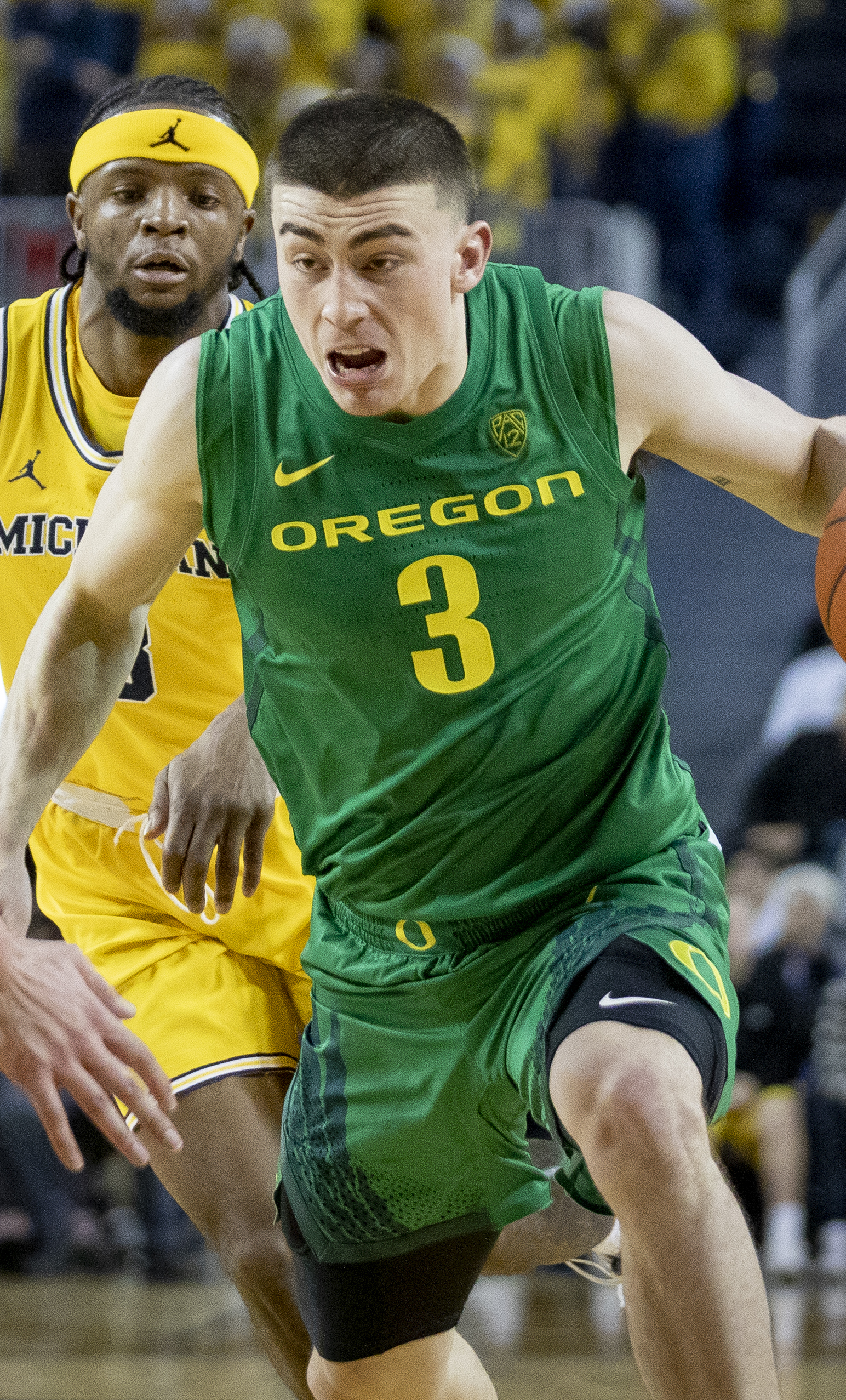 _O6A3456